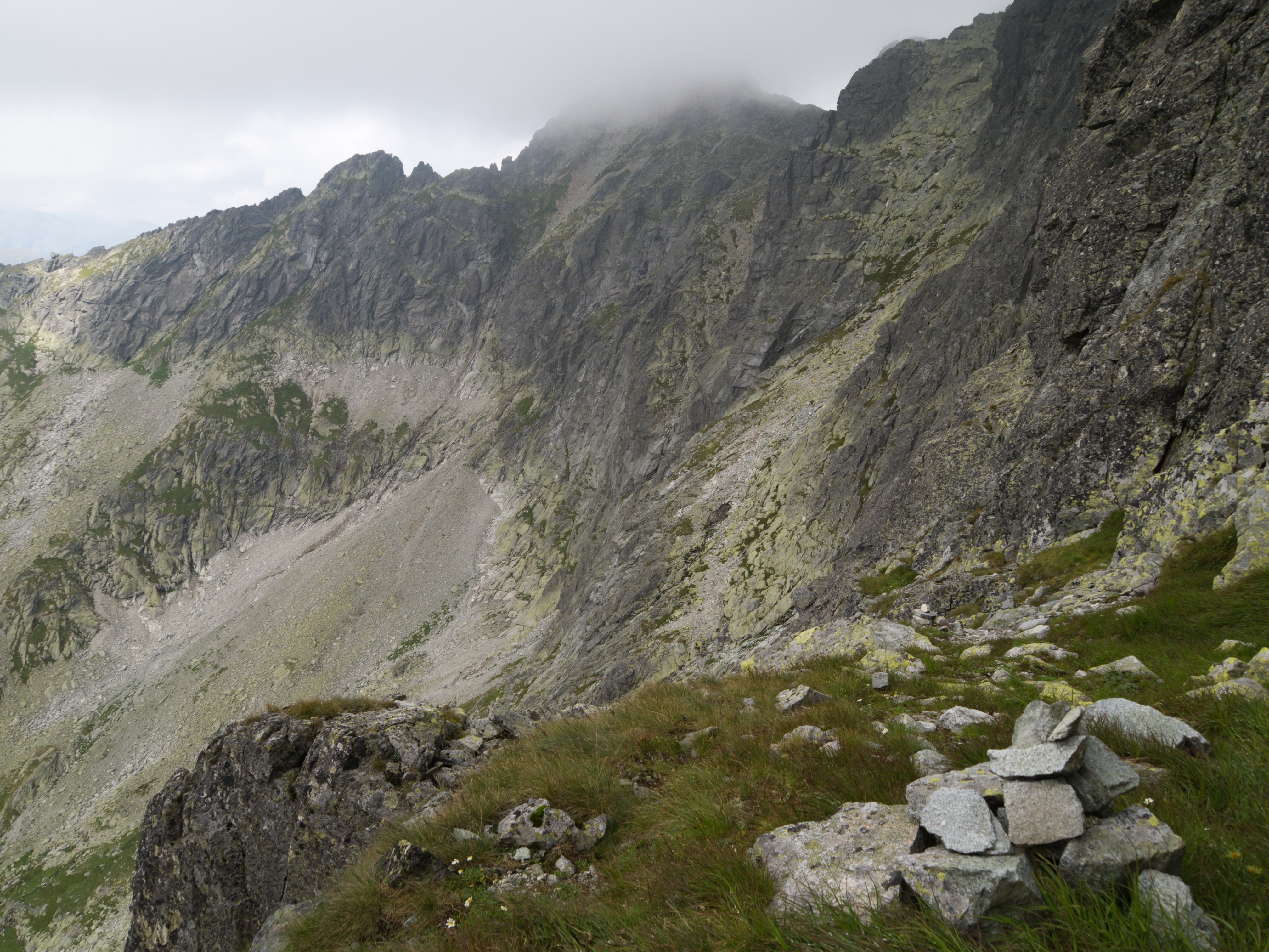 Kopczyk na Drodze po Głazach, w tle Cubrynka, Cubryna (w chmurach) i szeroki zachód – Wielka Mięguszowiecka Ławka